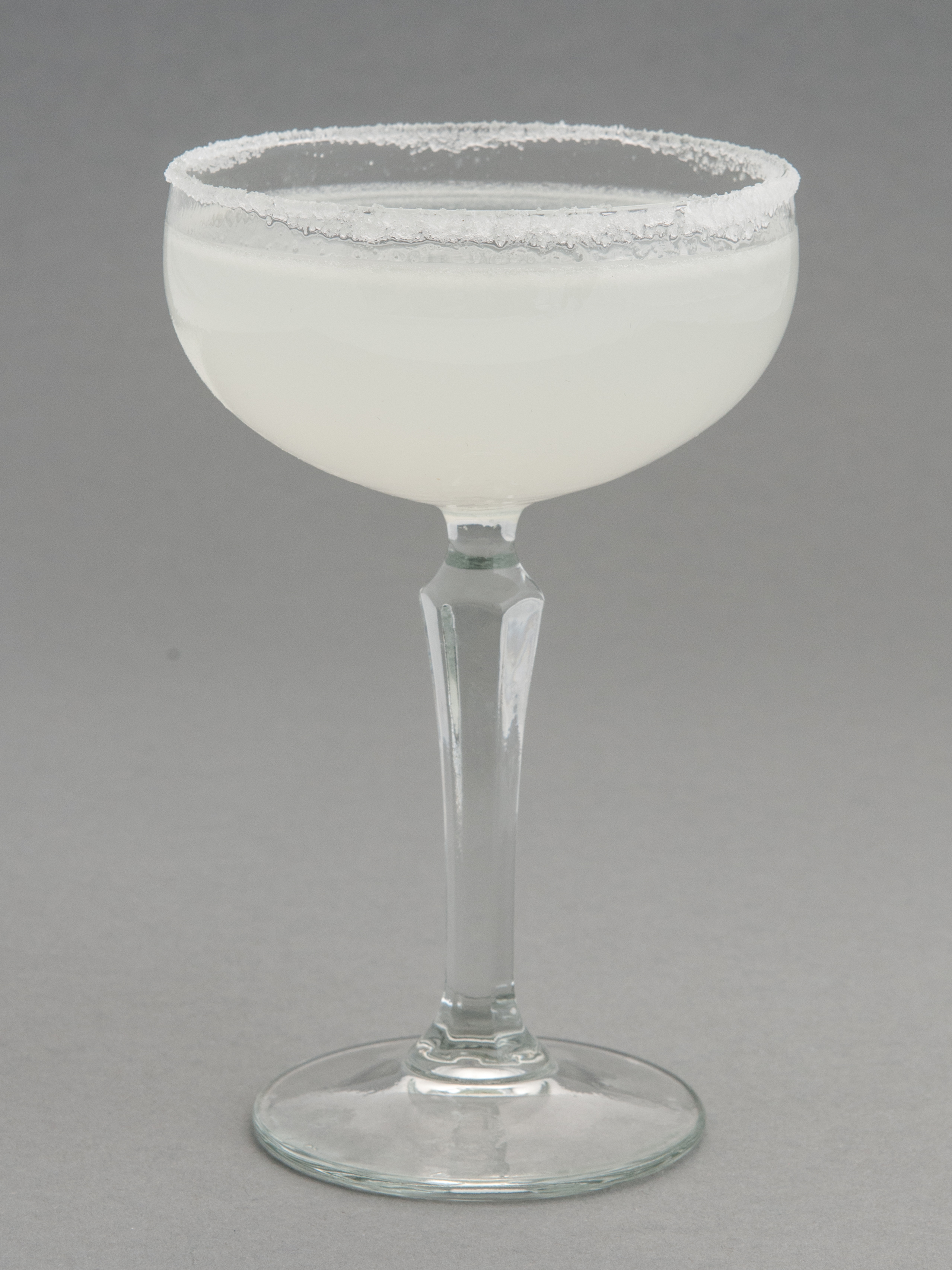 Margarita